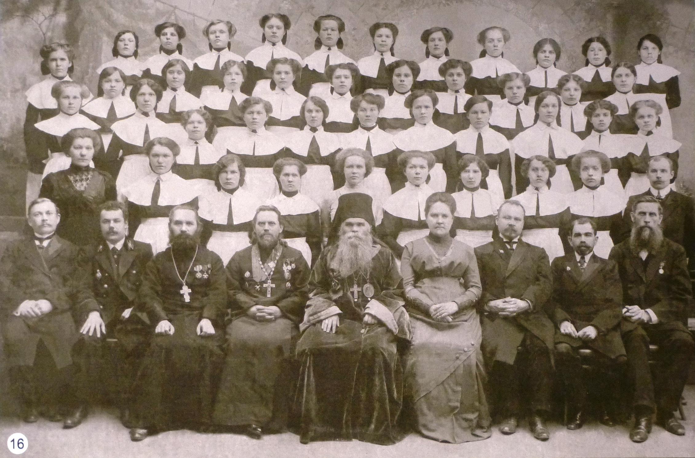 Выпуск женского епархиального училища в Петрозаводске. XIX век.(источник - Национальный музей Республики Карелия)